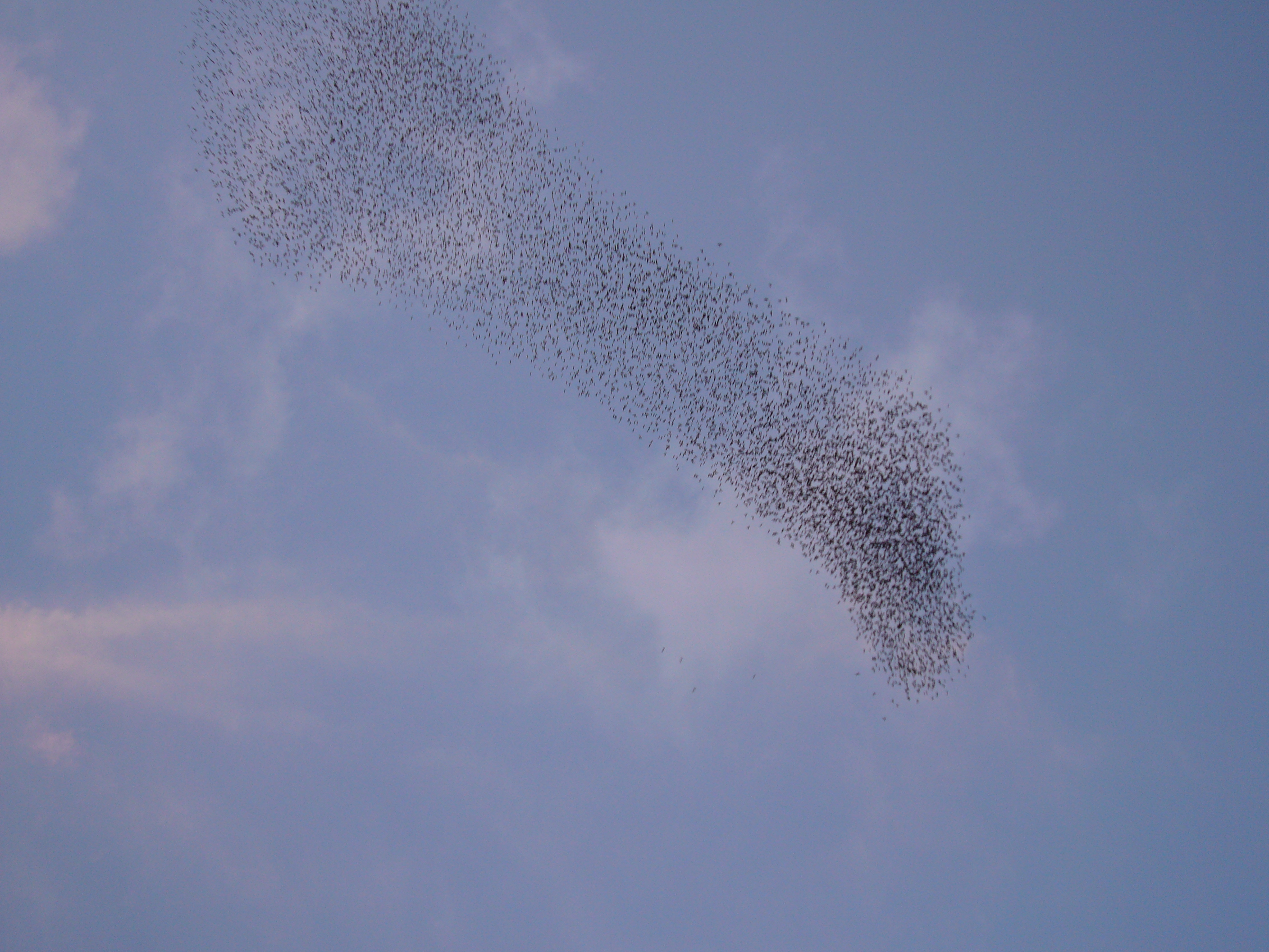 Roma, stormo di storni (Sturnus vulgaris) al tramonto